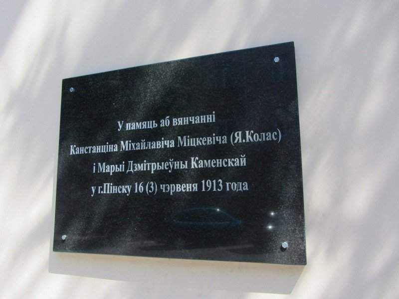 Пінск. Сабора Святой Варвары. Брама. Мемарыяльная дошка ў памяць аб вянчанні Канстанціна Міхайлавіча Міцкевіча (Я. Коласа) і Марыі Дзмітрыеўны Каменскай у г. Пінску 16 (3) чэрвеня 1913 года.